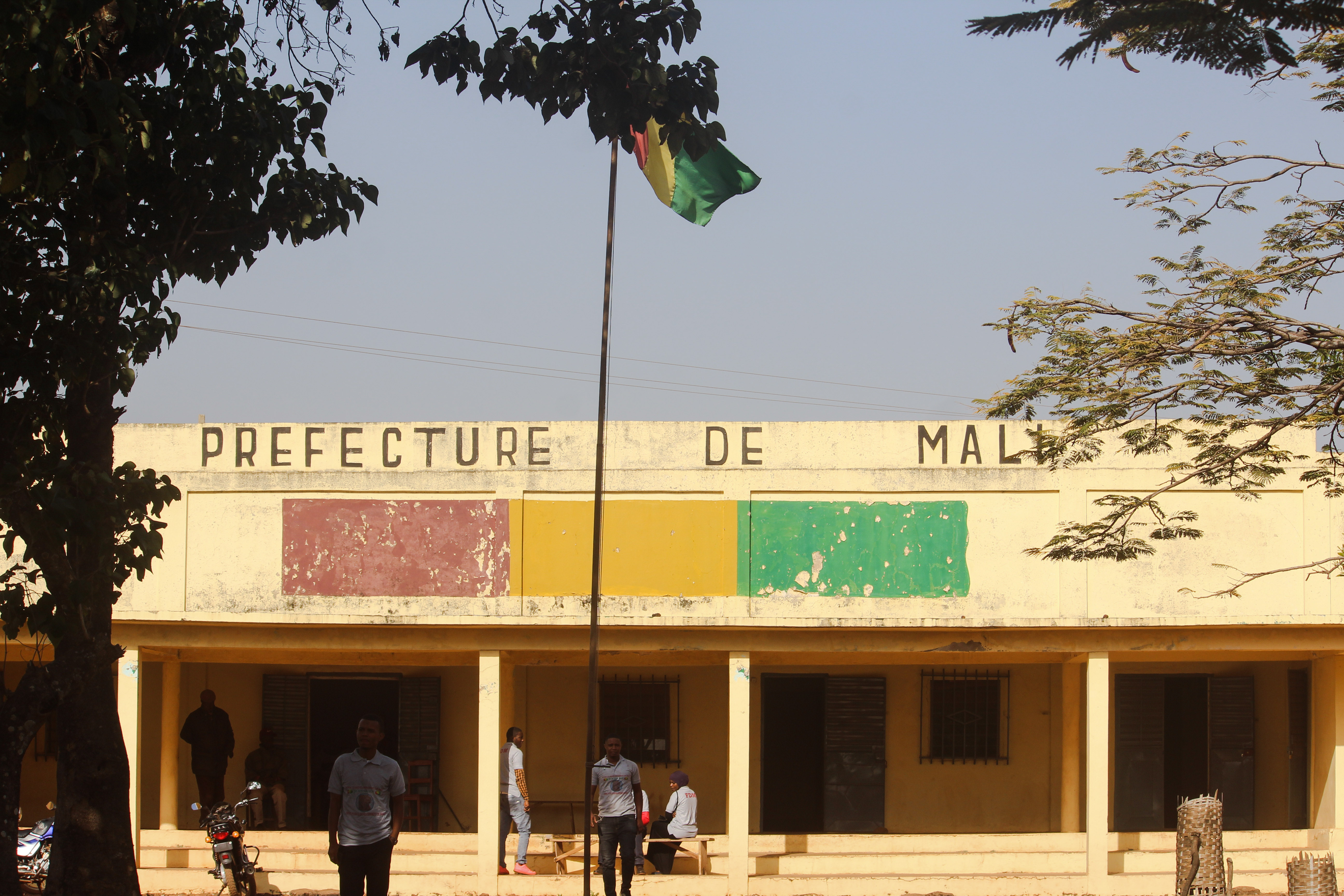 Bâtiment administratif de la préfecture Mali (Guinée)